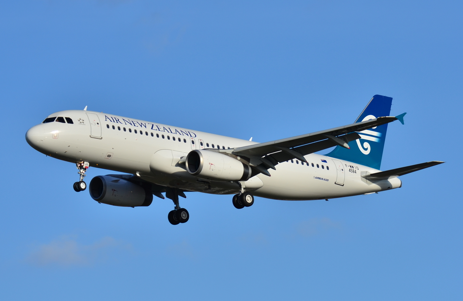 Photo prise à l'aéroport de Toulouse-Blagnac (LFBO) en France. Picture take at Toulouse-Blagnac Airport (LFBO) in France.